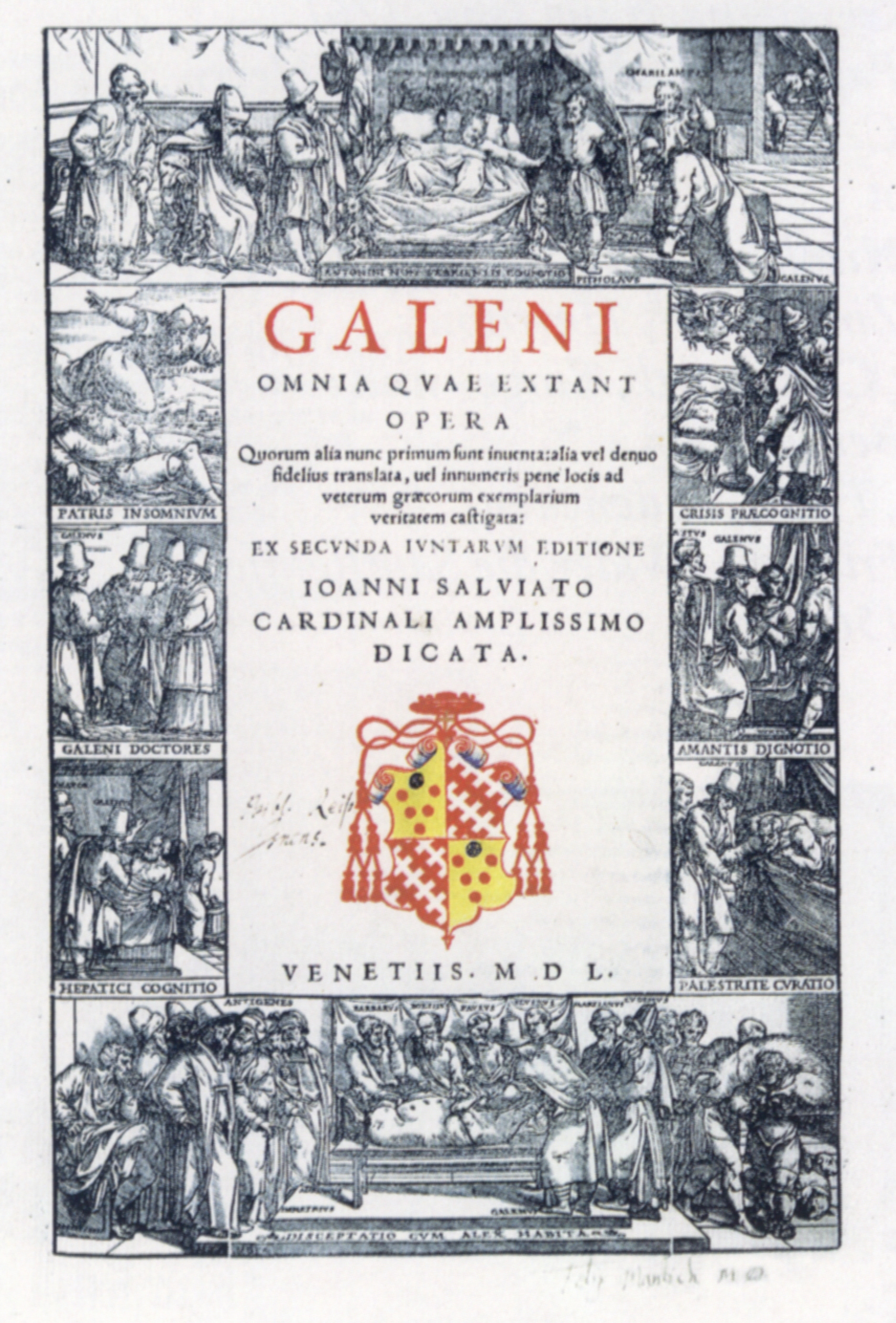 Galen: Opera, Iunta's Erben, Venedig 1550, Titelblatt mit Wappen des Kardinals Giovanni Salviati (Prädikantenbibliothek Isny)